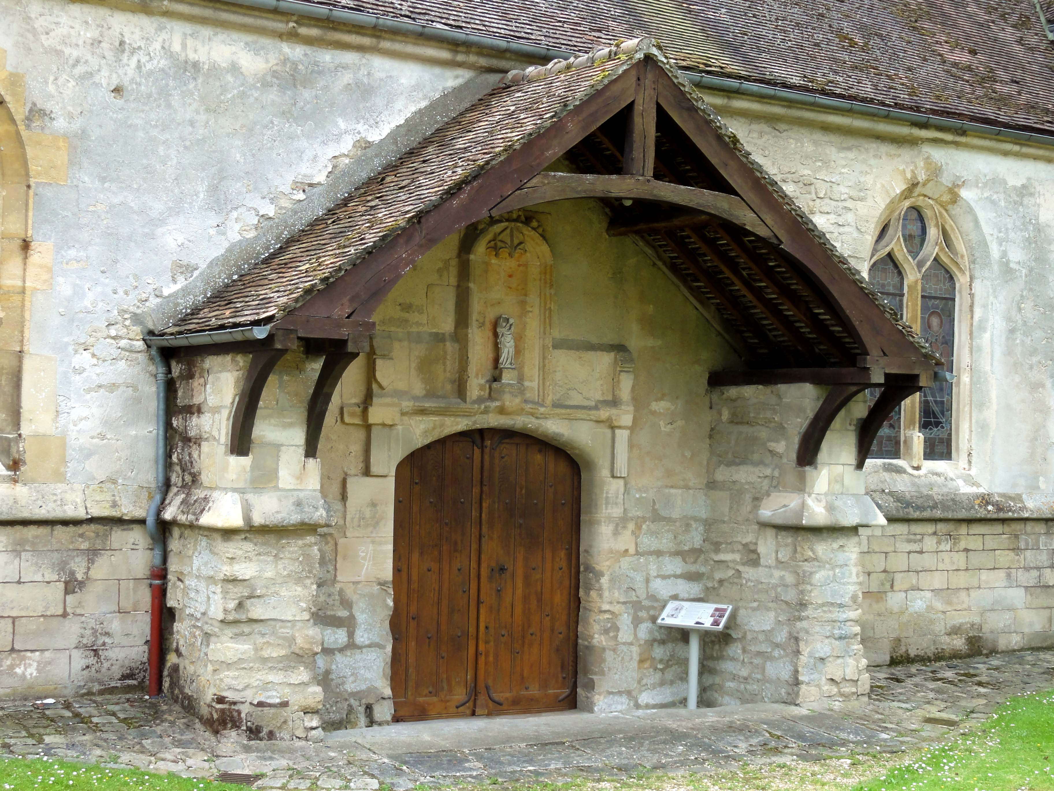 Église Saint-Germain de Mézy-sur-Seine - voir titre.